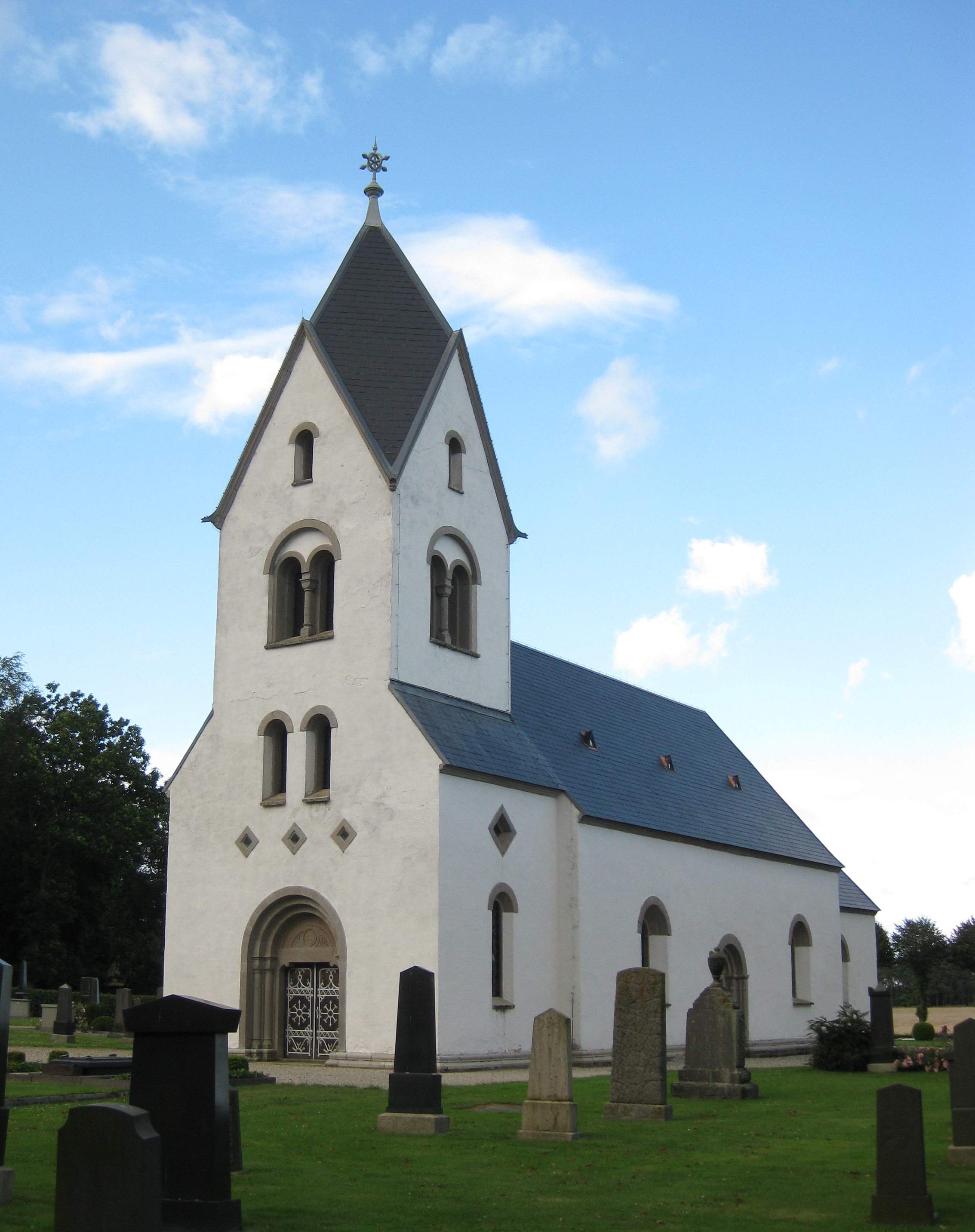 Östra Herrestads kyrka i Simrishamns kommun